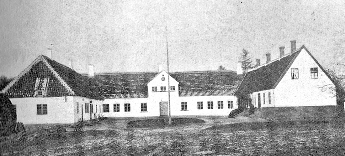 Lammehave er en lille herregård, som nævnes i 1419. Gården deles 1560 i Gammel Lammehave og Ny Lammehave. Gården blev samlet igen i 1679. Lammehave ligger i Ringe Sogn, Gudme Herred, Faabor-Midtfyn Kommune. Hovedbygningen er opført i 1734 og ombygget i 1795 og 1920.